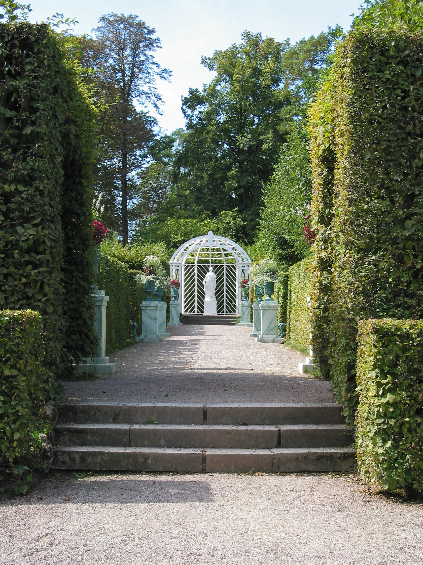 Der russische Garten den Herzogin Maria Pawlowna am Schloss Belvedere bei Weimar im strengen französischen Stil einrichten ließ. An ihn schließt sich auch noch ein Irrgarten an. Im Heckentheater wurden Kammerspiele und Konzerte aufgeführt.